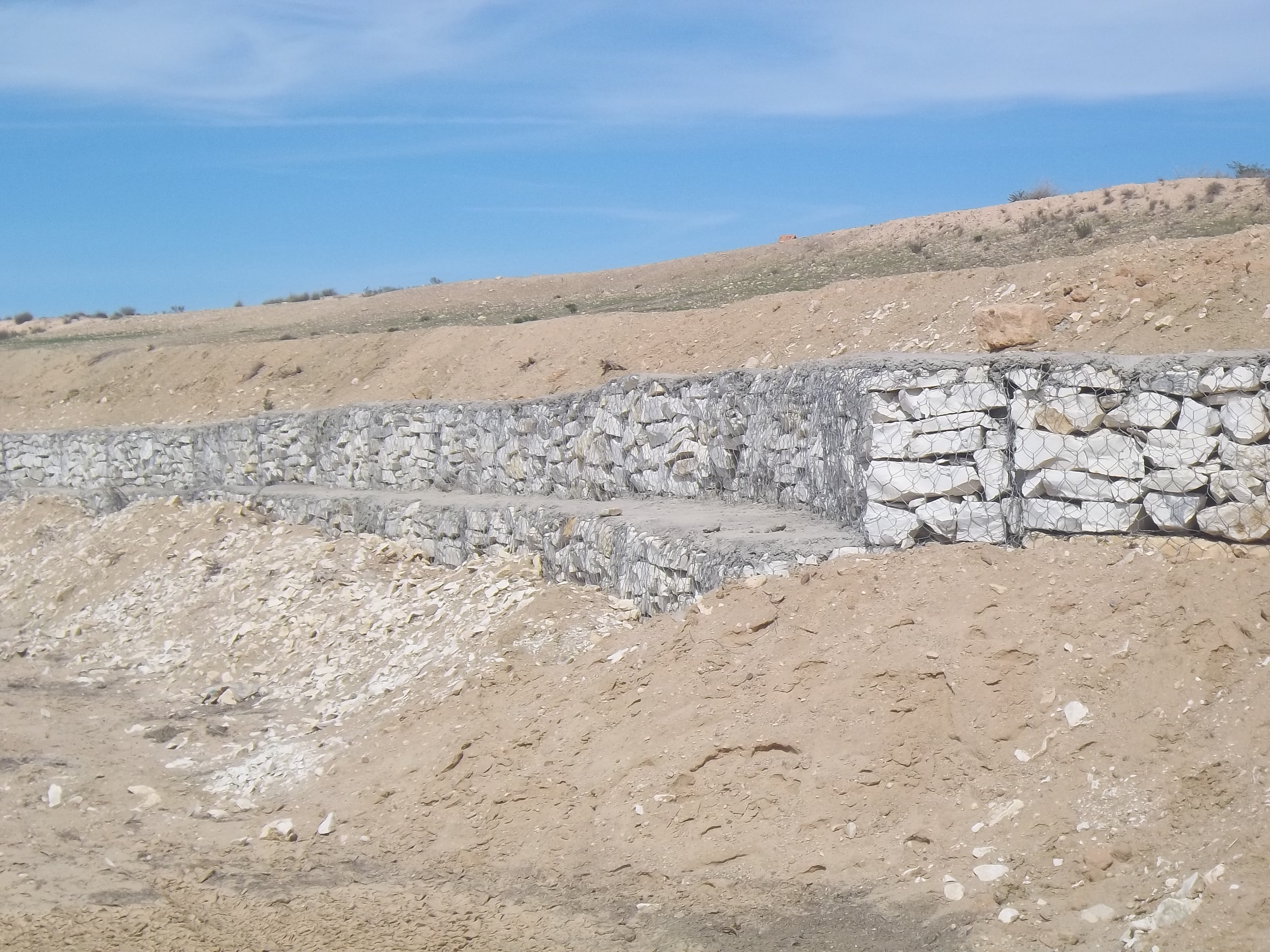 construction en Tunisie